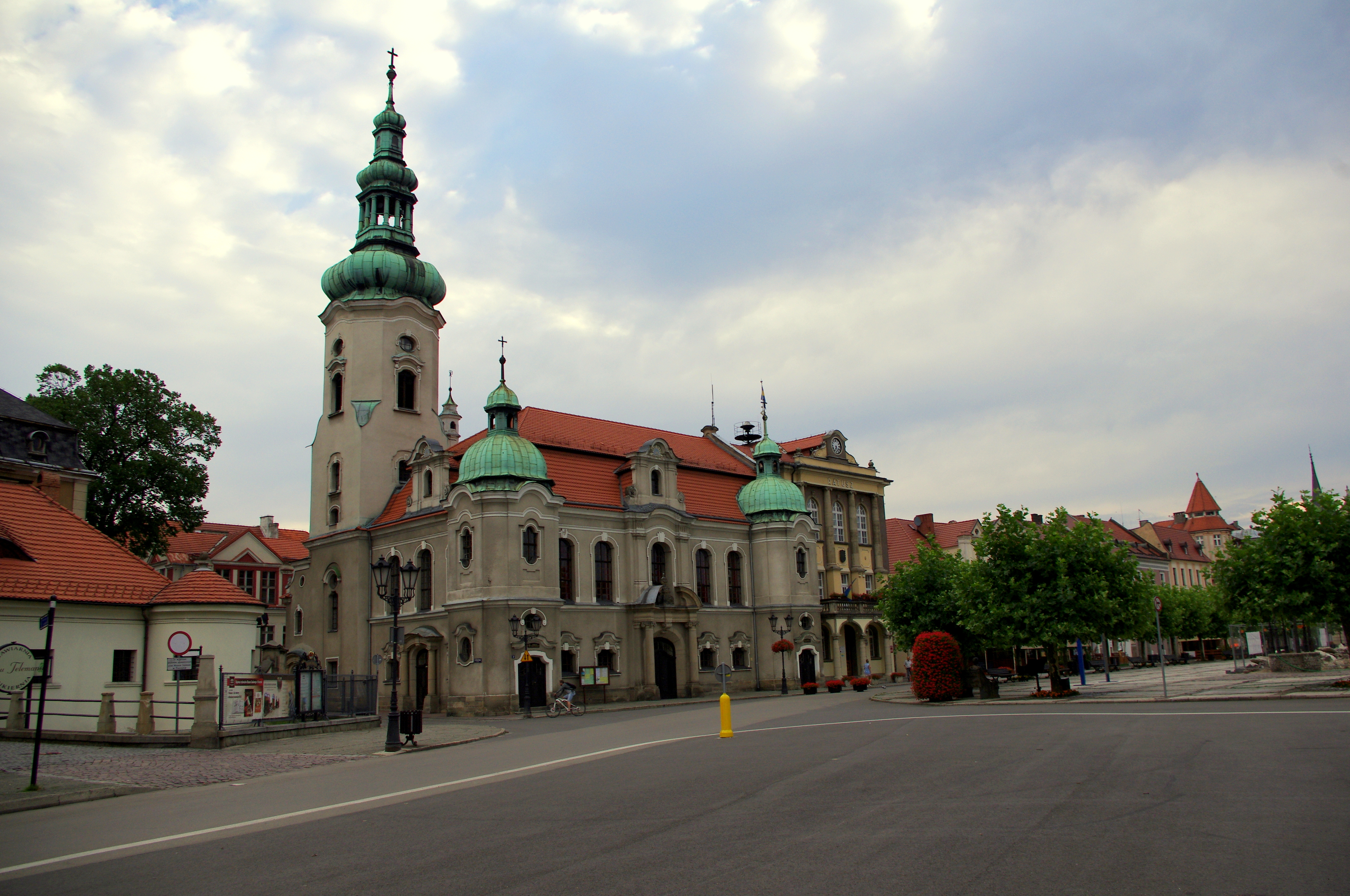 Kościół ewangelicki i ratusz w Pszczynie.